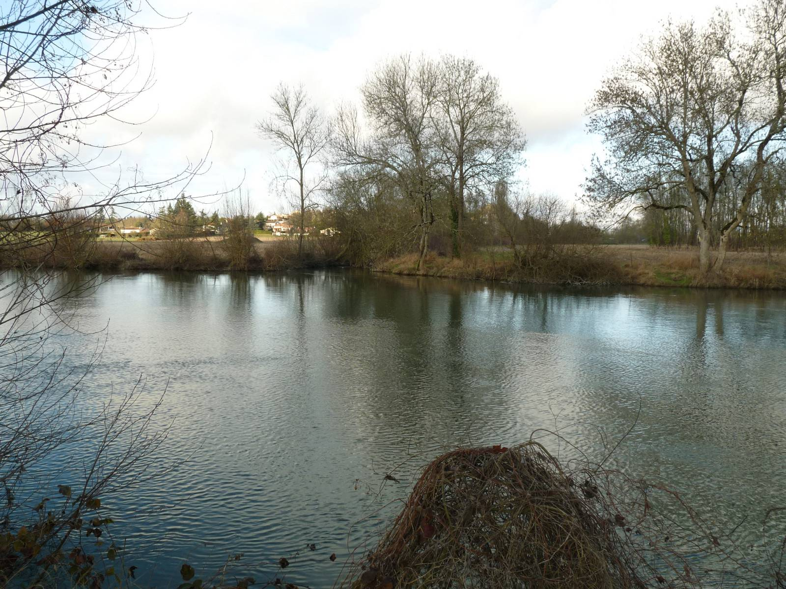 confluent de l'Argence et de la Charente vue de St-Yrieix (Charente), France